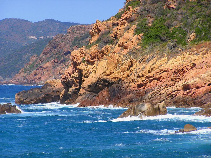 Bord de mer Corse